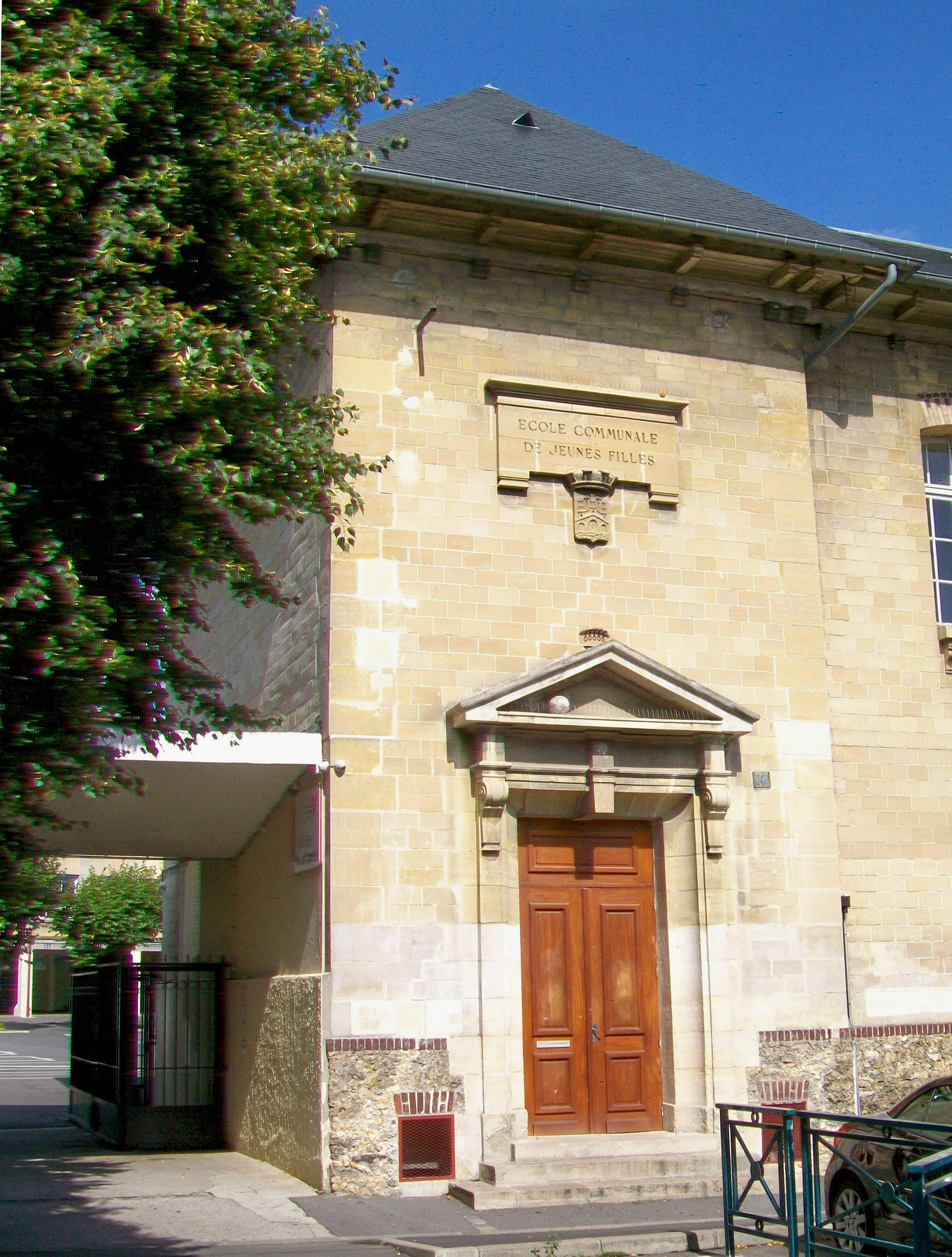 Porte de l'« école communale de jeunes filles » construite en 1903, place du Parc-aux-Charrettes.